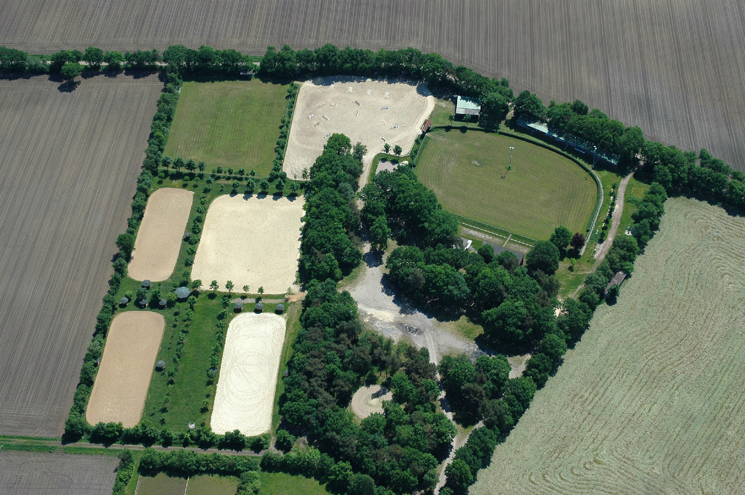 Turnierplatz in Elmlohe. Aus Serie: Fotoflug vom Flugplatz Nordholz-Spieka über Cuxhaven und Wilhelmshaven